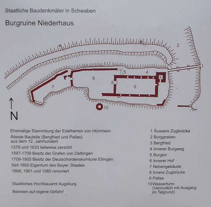 Infotafel am Burgeingang